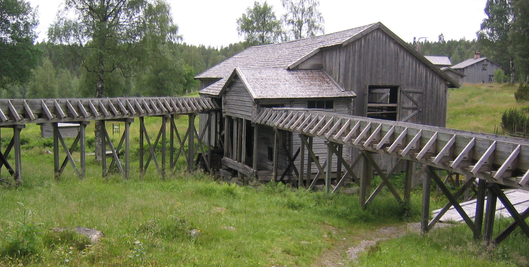 Sågen på Gudmundstjärn